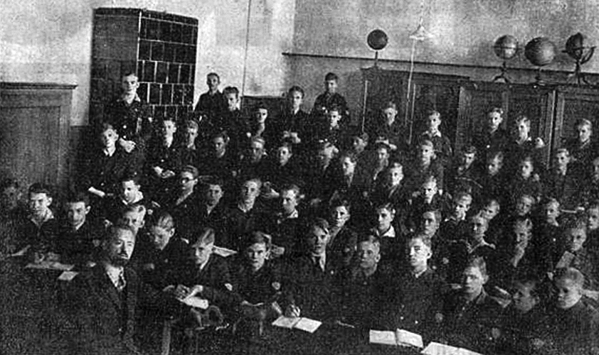 Profesoro Mieczysław Sygnarski antaŭ sia Esperanto-klaso en Bydgoszcz. La kurson laŭ Cseh-metodo partoprenis 90 lernantoj.